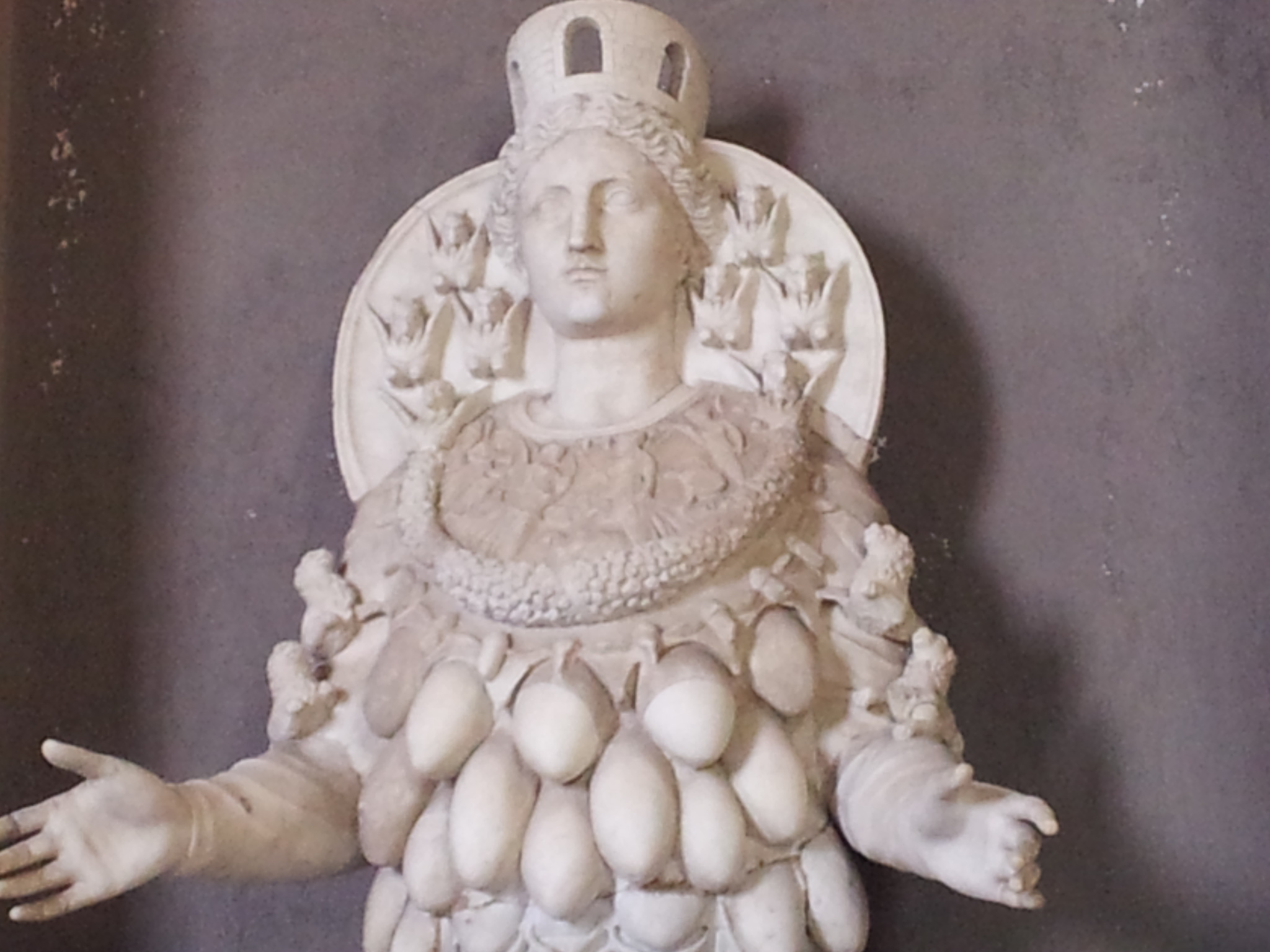 Estátua de Artemis de Efeso- Museus Vaticanos